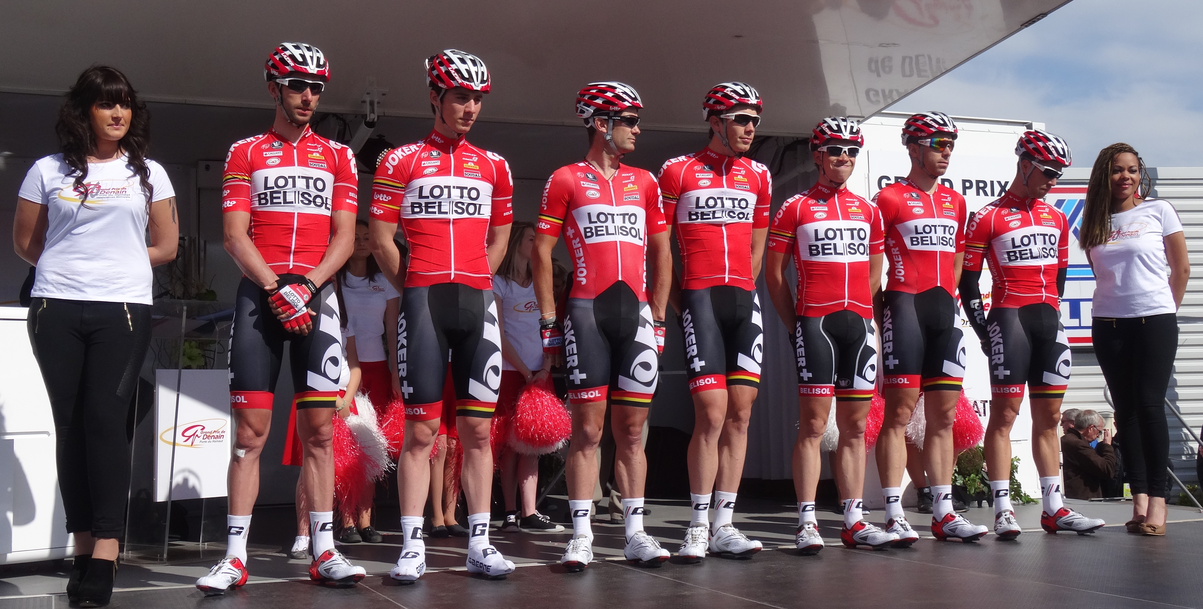 Reportage réalisé le jeudi 17 avril à l'occasion du départ et de l'arrivée du Grand Prix de Denain 2014 à Denain, Nord, Nord-Pas-de-Calais, France.